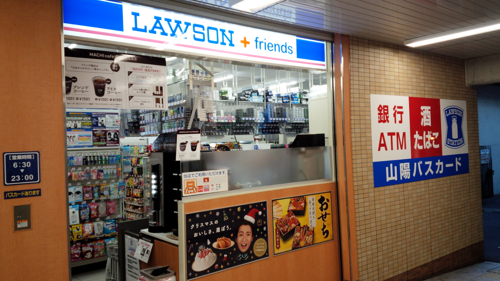 山陽電鉄沿線で展開している「ローソン＋フレンズ」